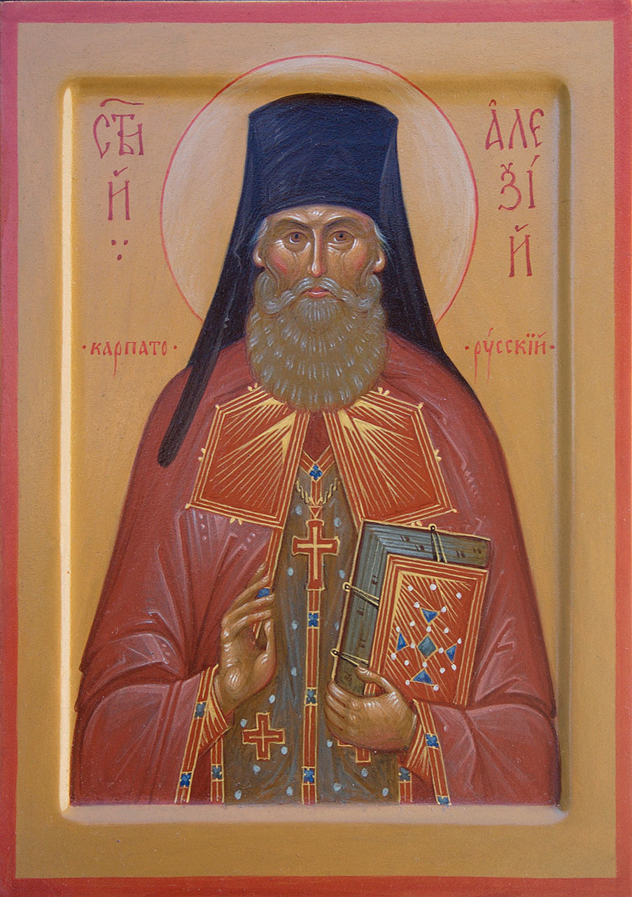 Икона прп Алексия Карпаторусского